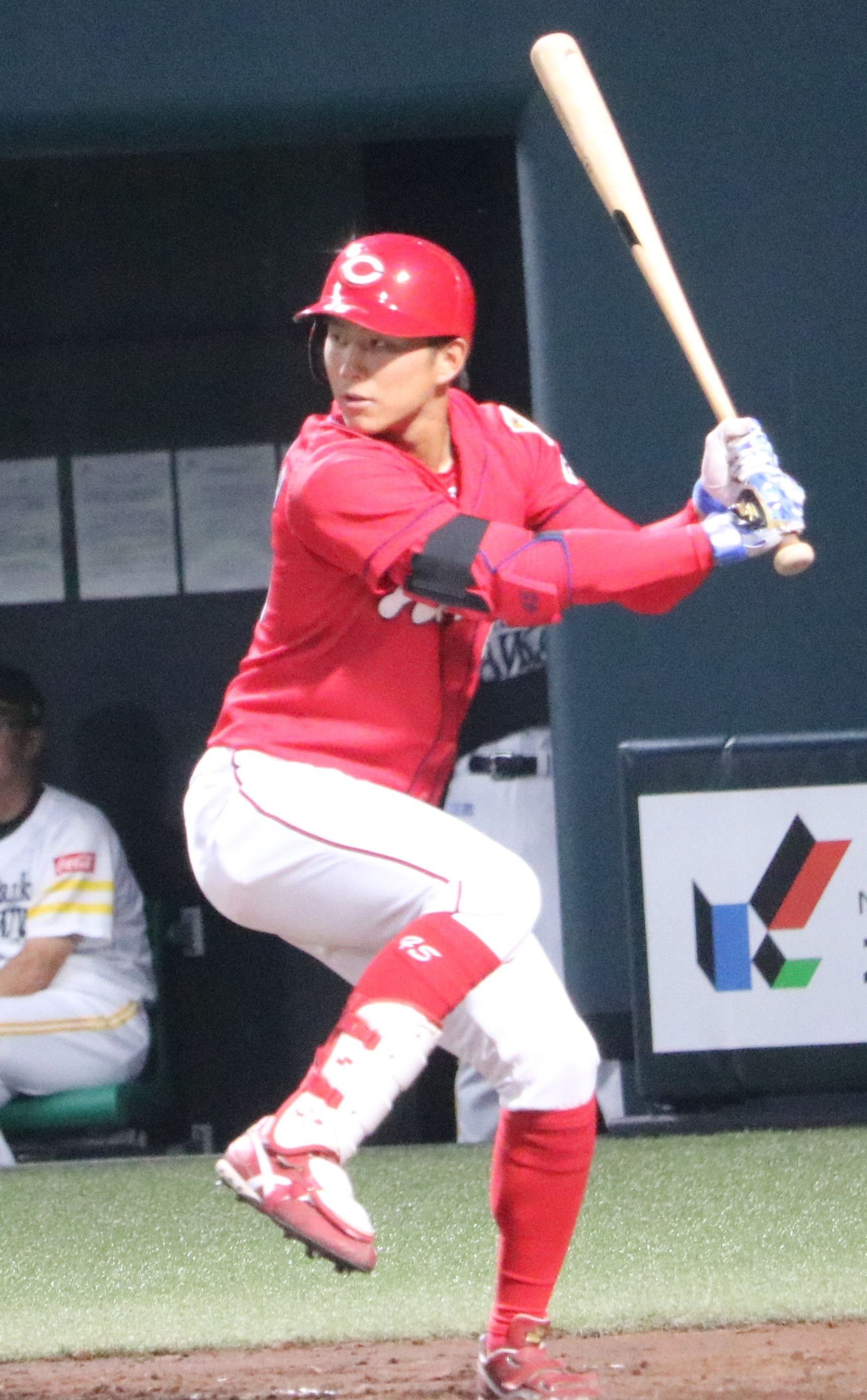 打席での桒原(2017/7/28 ウエスタンリーグにて)